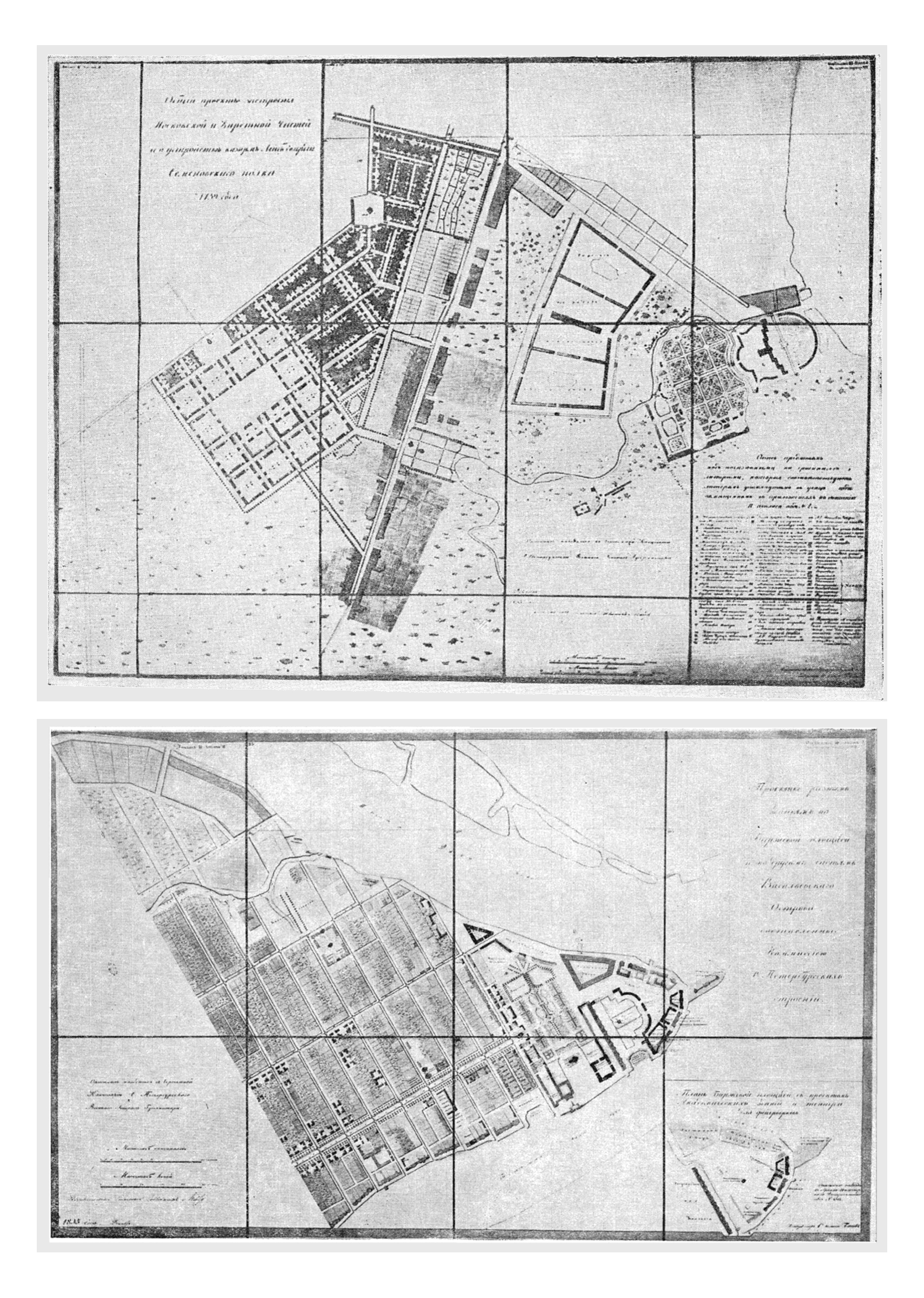 Копии чертежей, выполненных при Комиссии о Санкт-Петербургском строении. Атласы А. Л. Майера